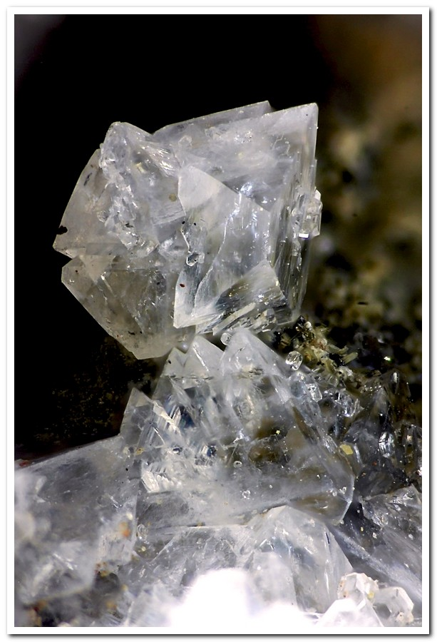 Campo de Calatrava, Ciudad Real, España. (Colección Rafa Muñoz Alvarado) Encuadre 3 mm.